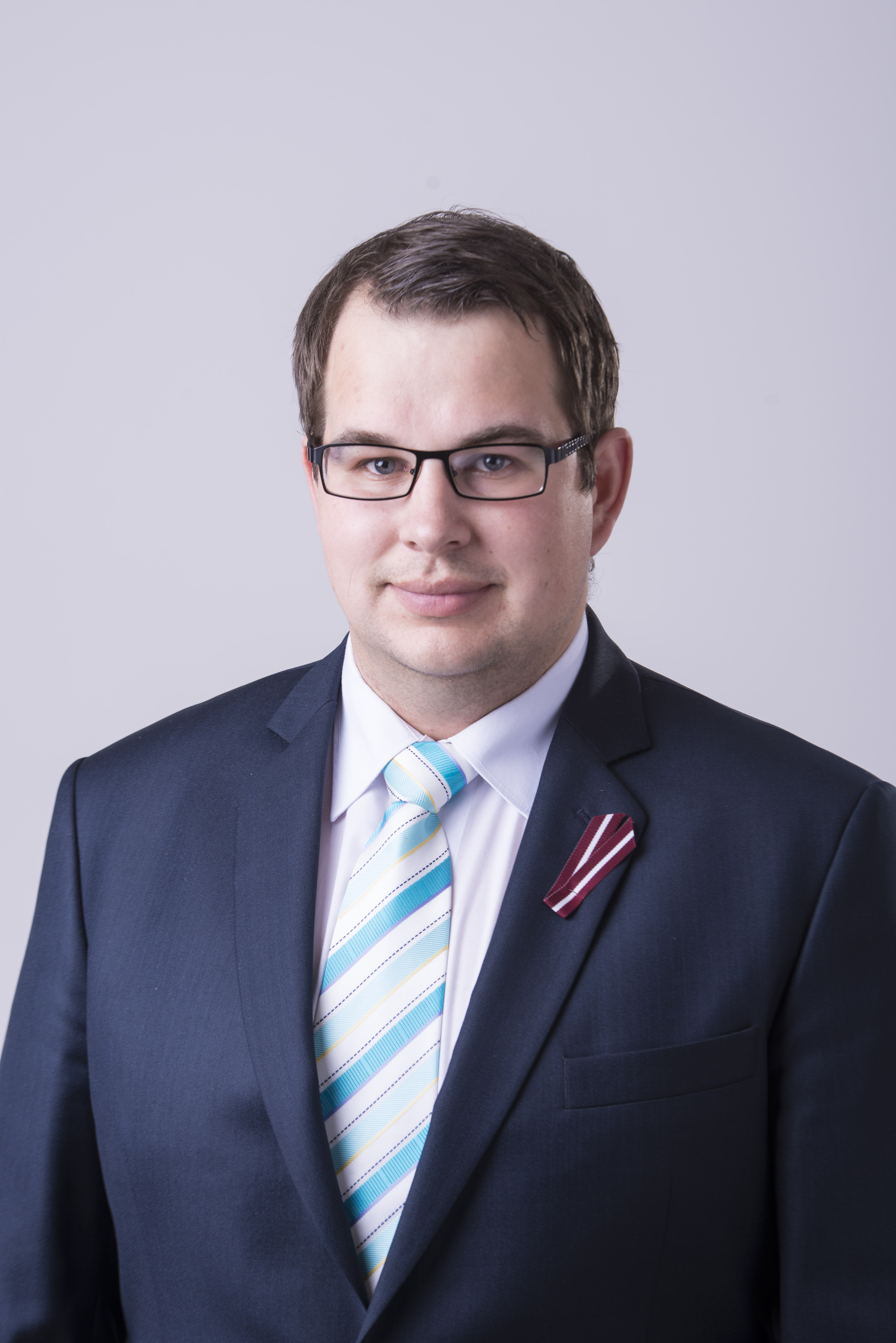 2014.gada 9.decembris. 12.Saeimas deputāts Edgars Putra. Foto: Reinis Inkēns, Saeimas Kanceleja Izmantošanas noteikumi: saeima.lv/lv/autortiesibas